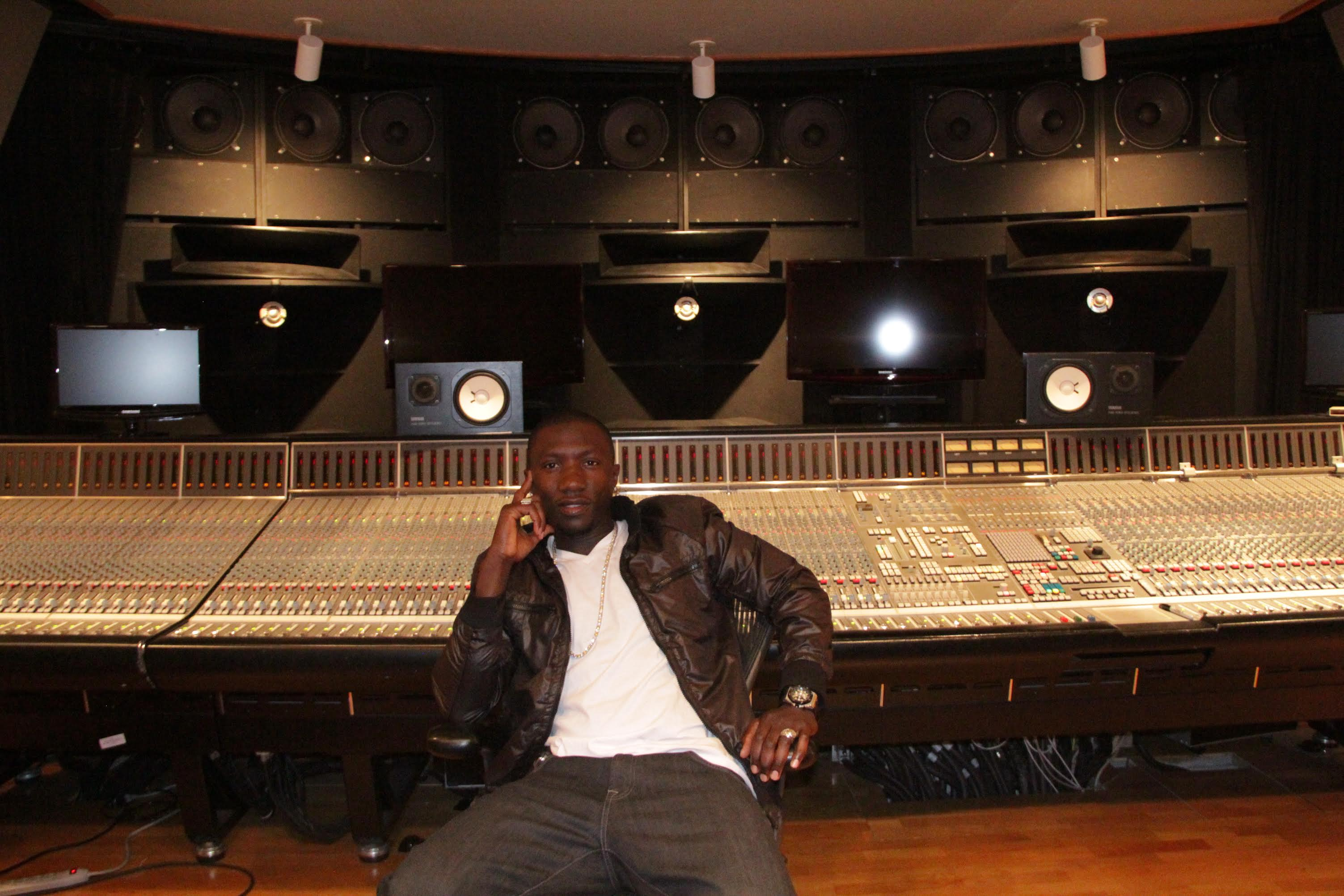 Djibril Gibson Kagni during recording session